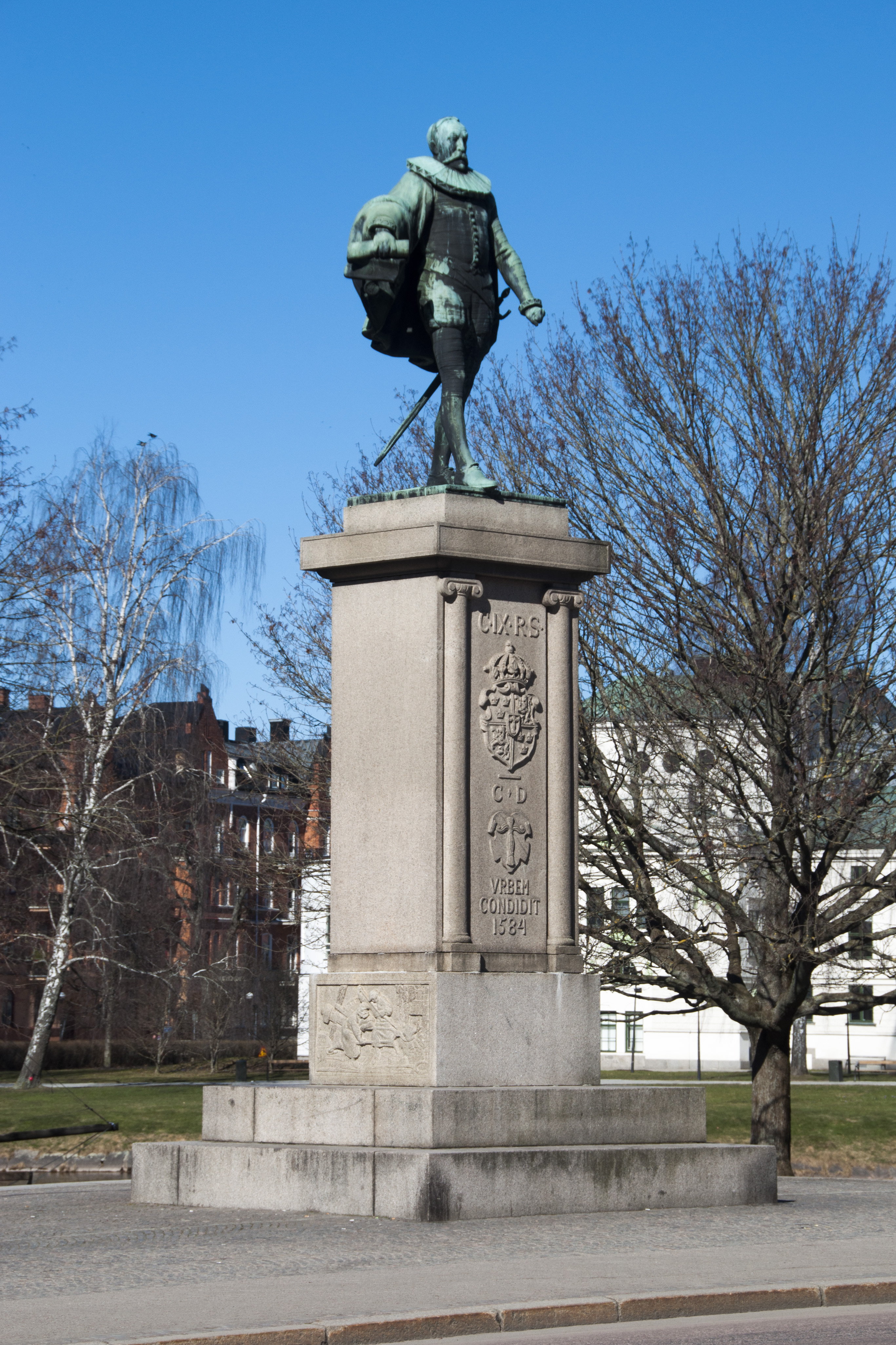 "Hertig Karl", av Christian Eriksson, avtäckt 1926